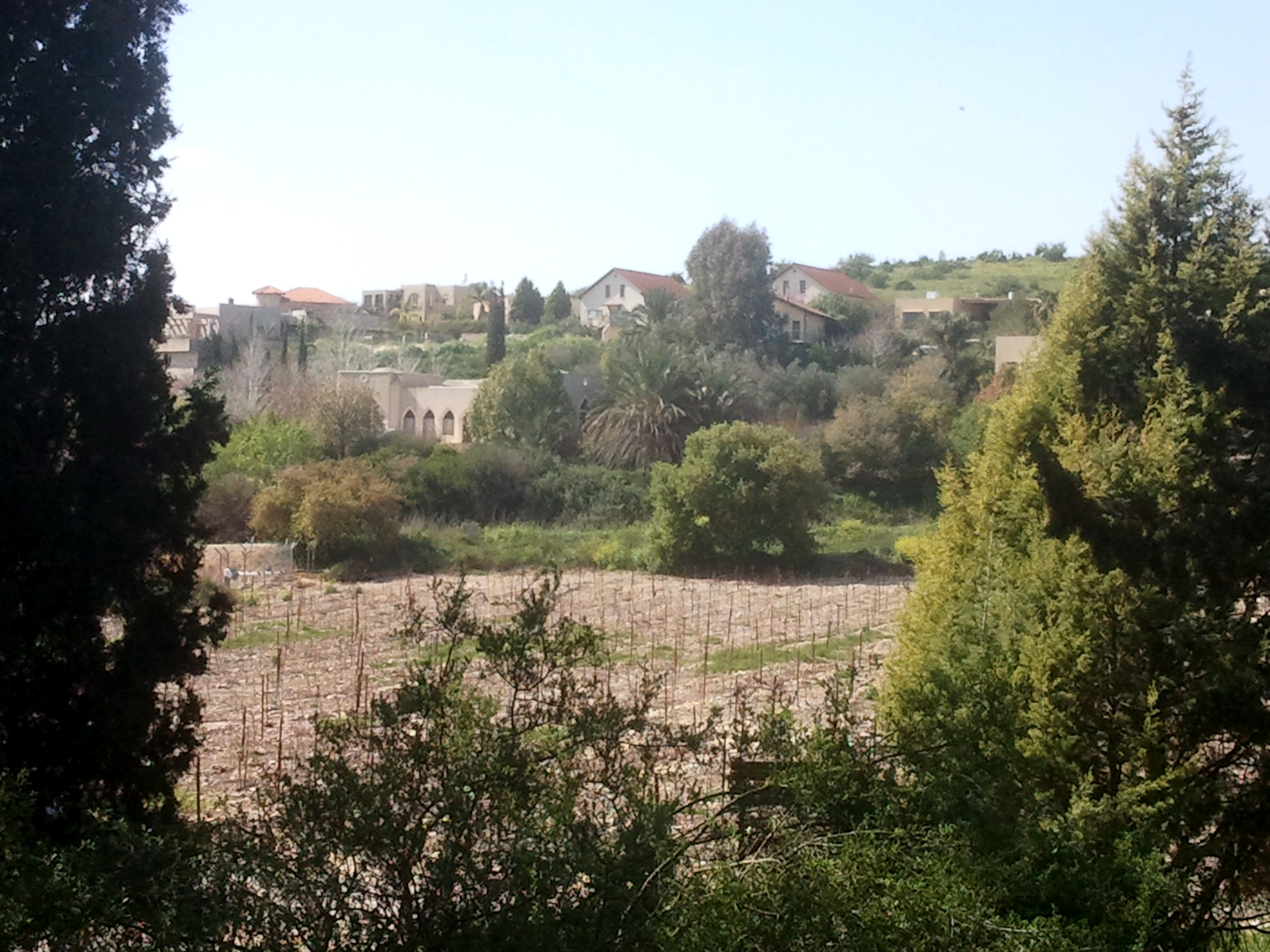 ביתו של יואב גלנט במושב עמיקם תצפית מההר נעגול